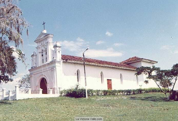 Imagen de la Iglesia de San José, La Victoria, Valle del Cauca